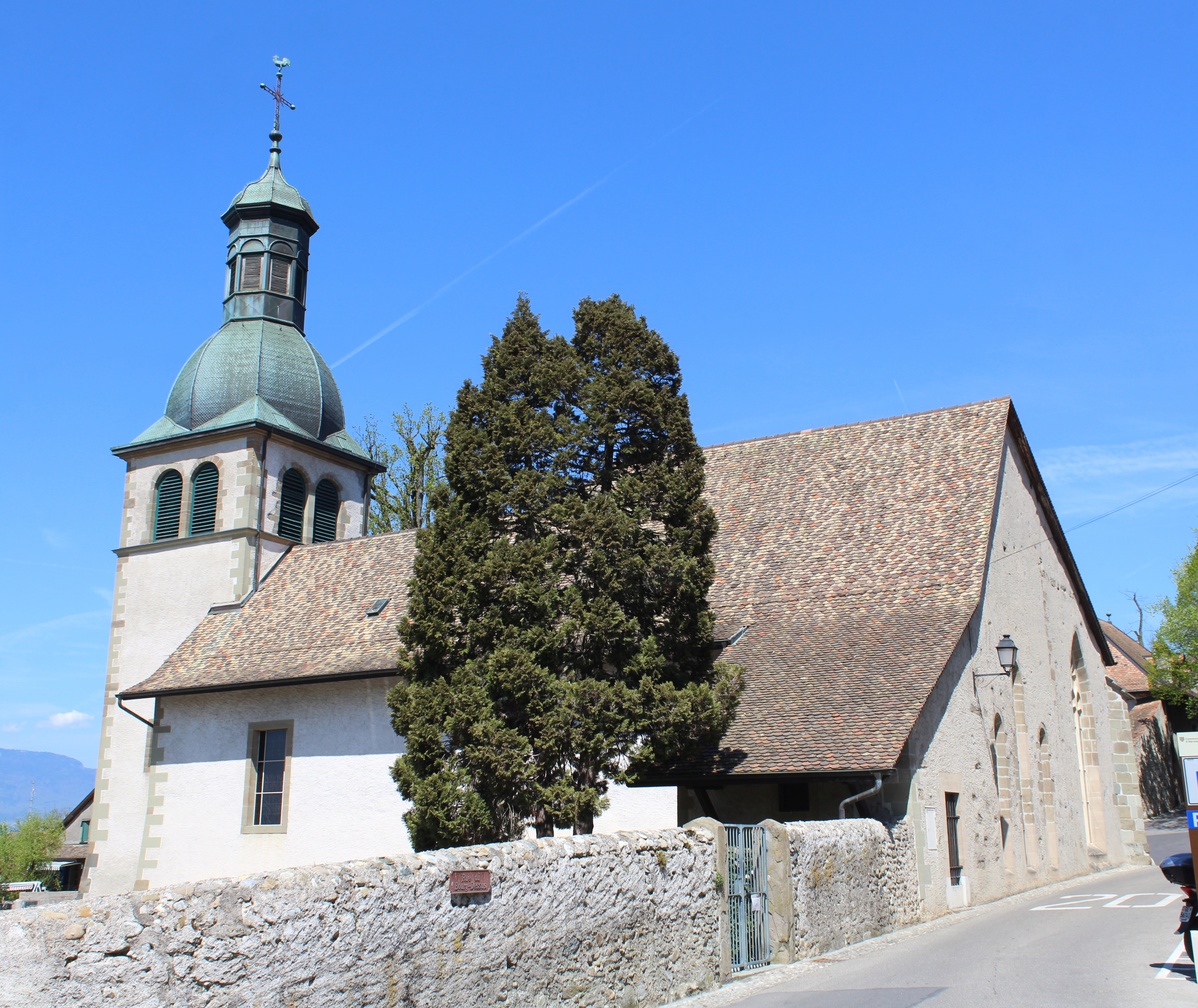 Église Saint-Georges de Hermance.